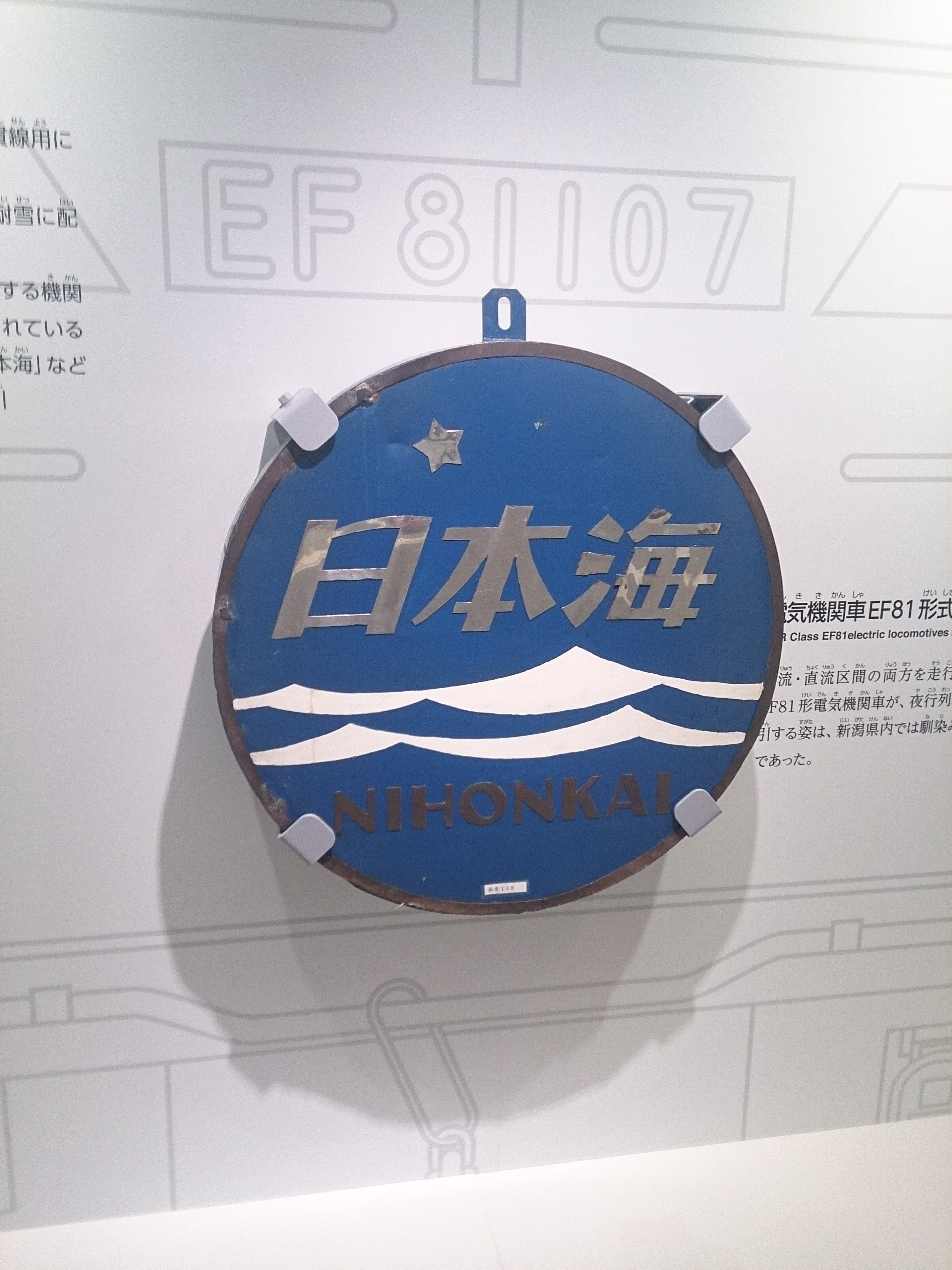 新津鉄道資料館・館内